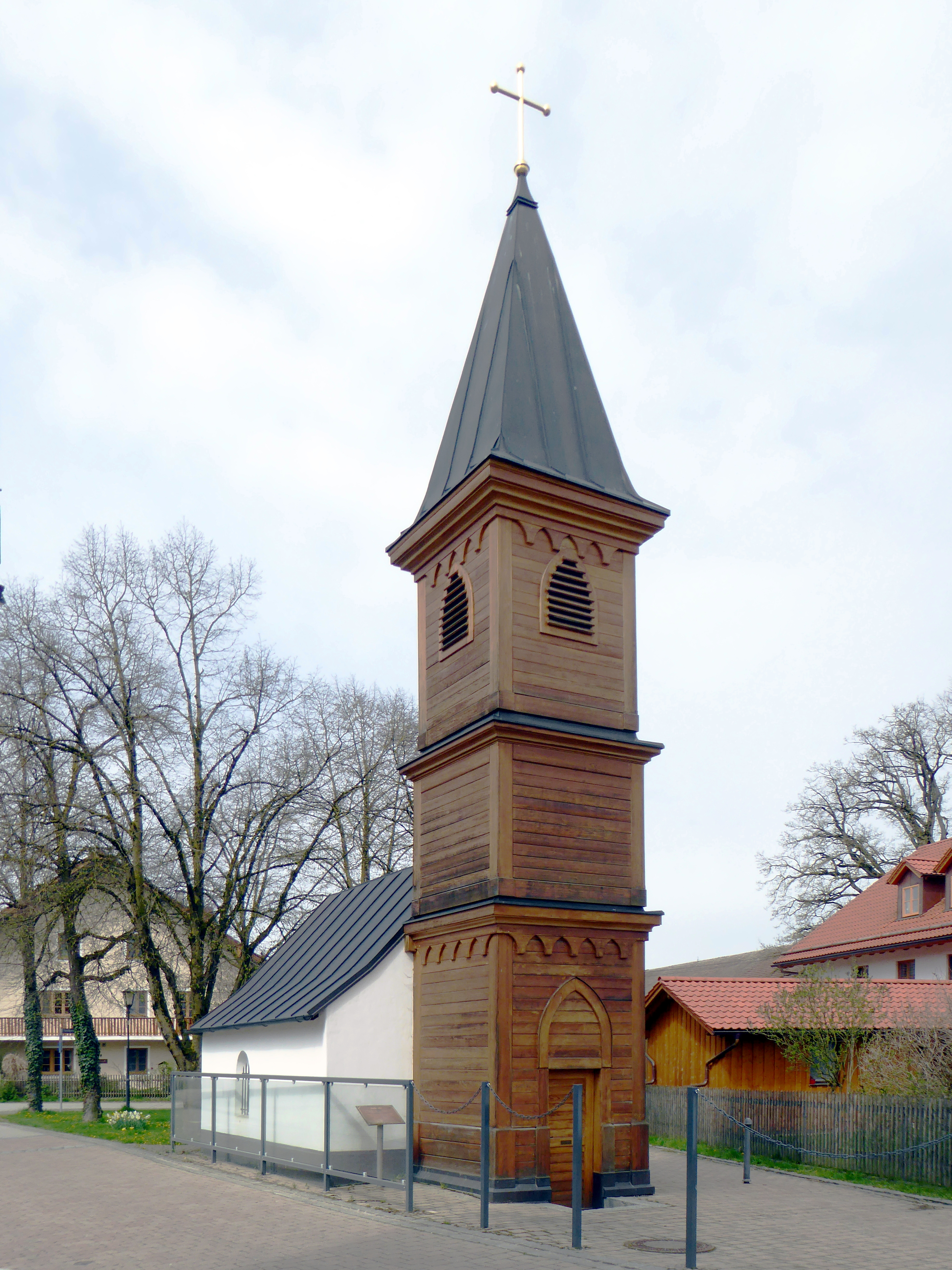 Boarisch: D' Annakapojn vo Ednschtockach, vo Ostn xeng.